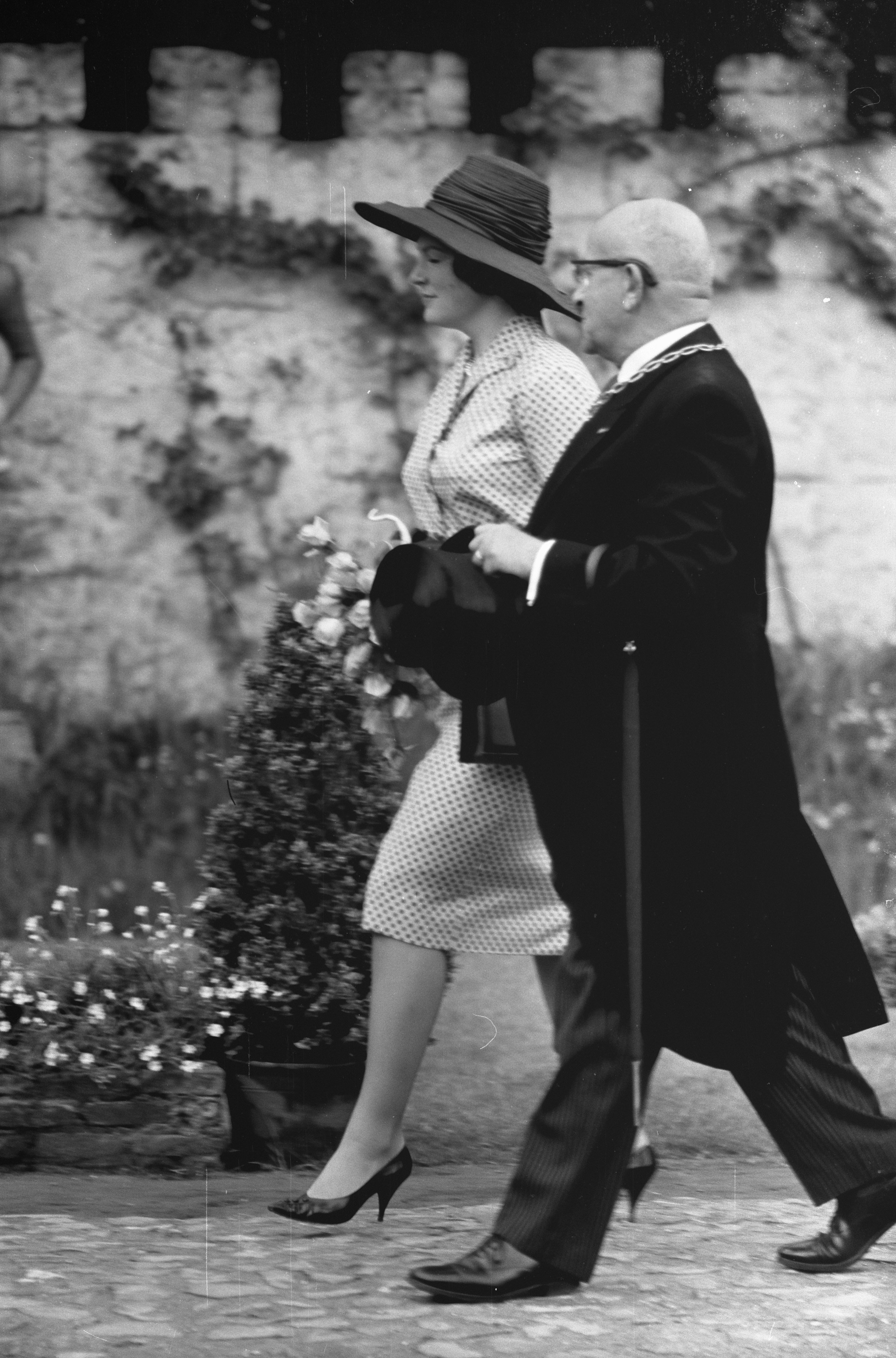 Collectie / Archief : Fotocollectie Anefo Reportage / Serie : [ onbekend ] Beschrijving : Bezoek van Prinses Irene aan Noord-Brabant. Rondgang over de "Efteling" met burgemeester van der Heijden, op het Herautenplein Datum : 27 mei 1961 Locatie : Noord-Brabant Trefwoorden : bezoeken, burgemeesters, prinsessen, rondgangen Persoonsnaam : Heijden, Irene, prinses Fotograaf : Pot, Harry / Anefo Auteursrechthebbende : Nationaal Archief Materiaalsoort : Negatief (zwart/wit) Nummer archiefinventaris : bekijk toegang 2.24.01.05 Bestanddeelnummer : 912-5408 Reacties Geplaatst door Maaike op 24 november 2012 - 15:08. burgemeester van Loon op Zand-Kaatsheuvel persoonsnamen: R.J.Th van der Heijden locatie: Kaatsheuvel (Noord-Brabant)